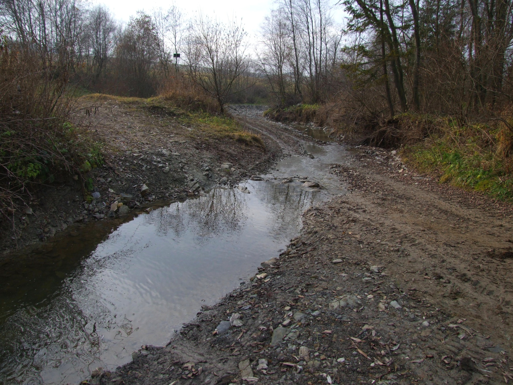 Dursztyński Potok przy Lorencowych Skałkach